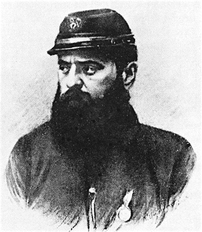 Camillo Zancani (1820 – 1888)